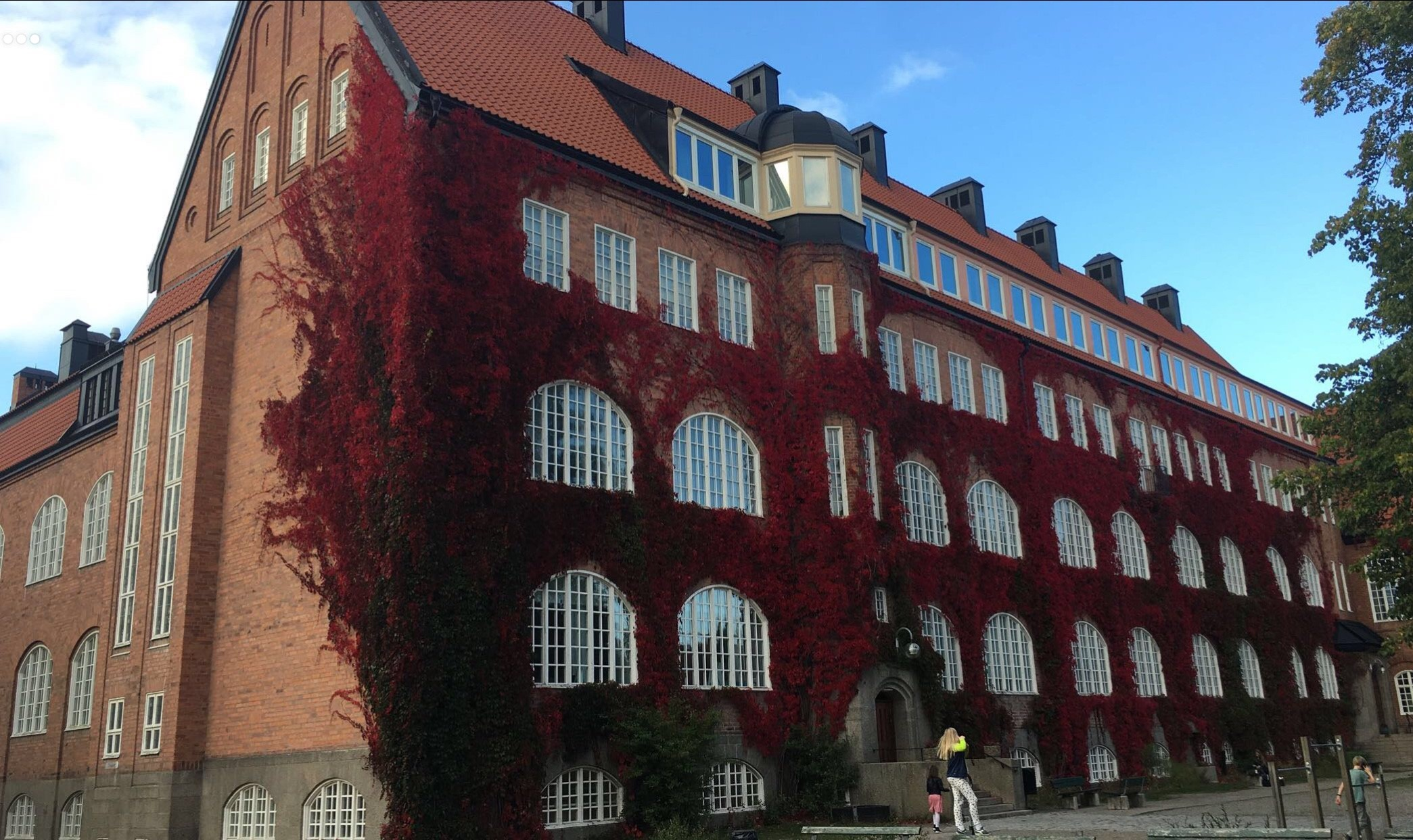 Uppsala Musikklasser på hösten. F.d. Seminariet, Uppsala, i stadsdelen Luthagen.